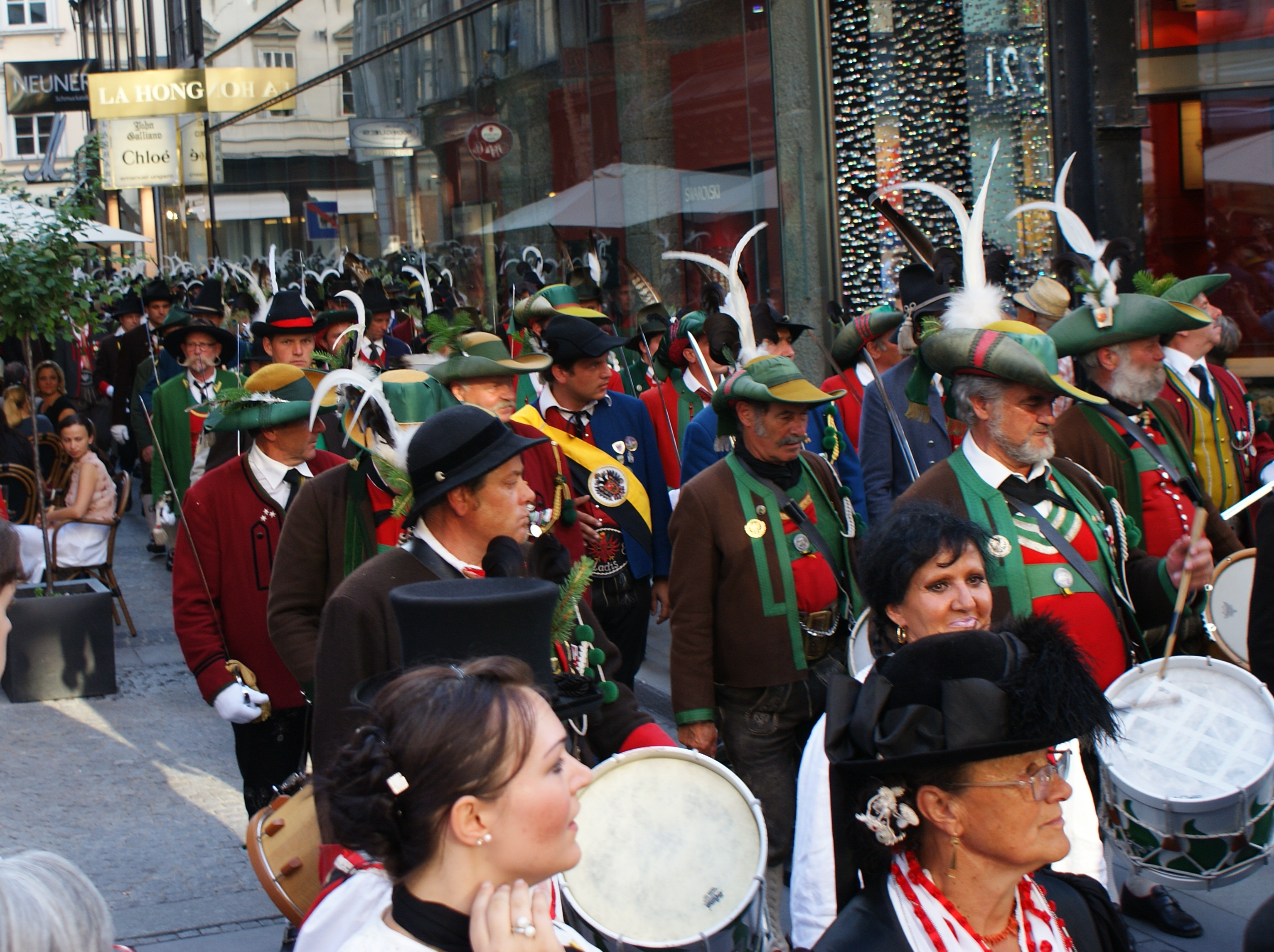 Tiroler Schützen beim Begräbnis von Otto Habsburg-Lothringen 2011